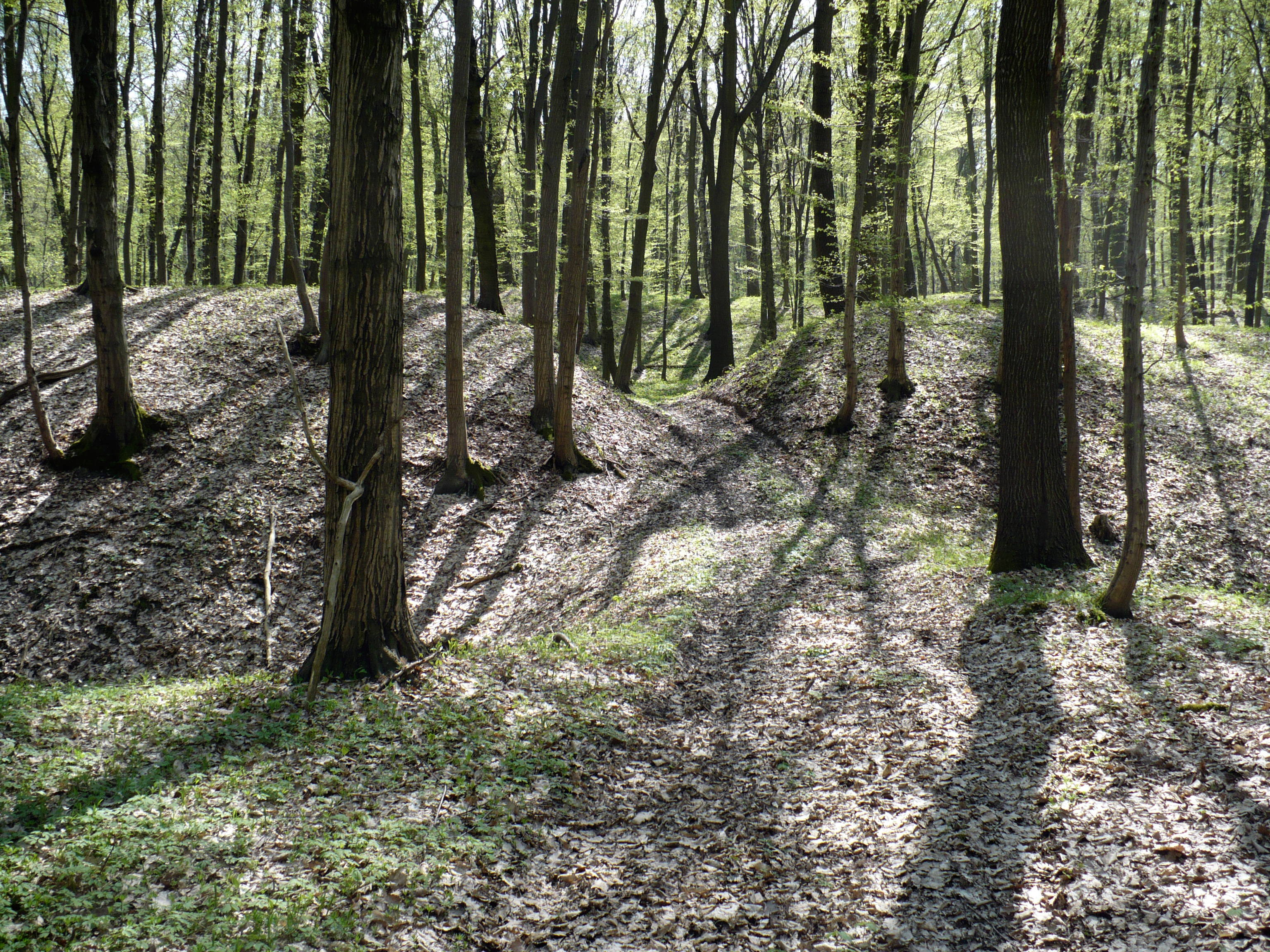 Češovské valy. Průlom vnějším valem od západu.